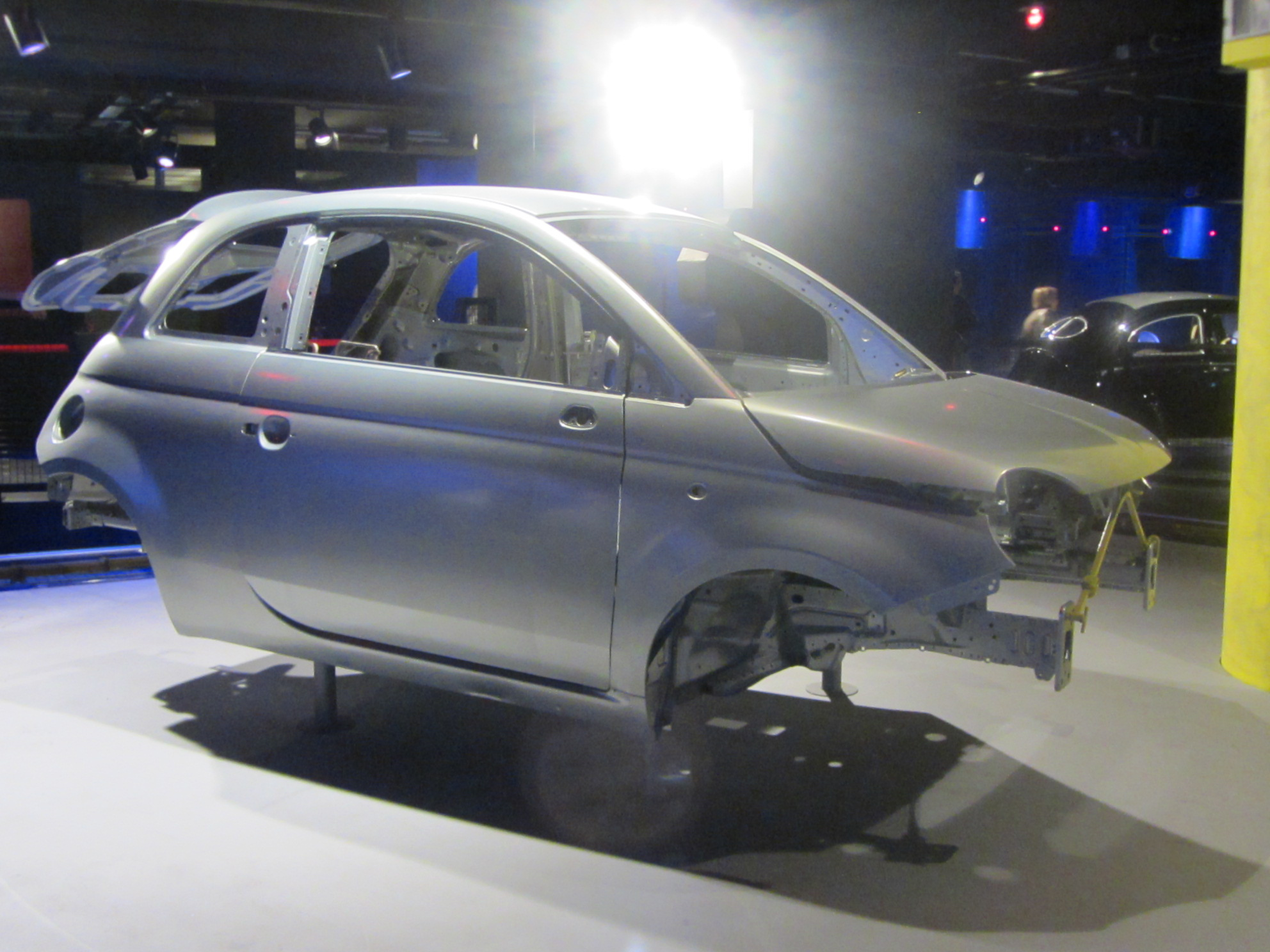 Tour su rotaia a bordo di un vagoncino a 4 posti per vedere a 360 gradi la linea di assemblaggio di una Fiat 500 (2007) dallo stampaggio alla verniciatura all'assemblaggio e alla finitura. in questa foto: Verniciatura base